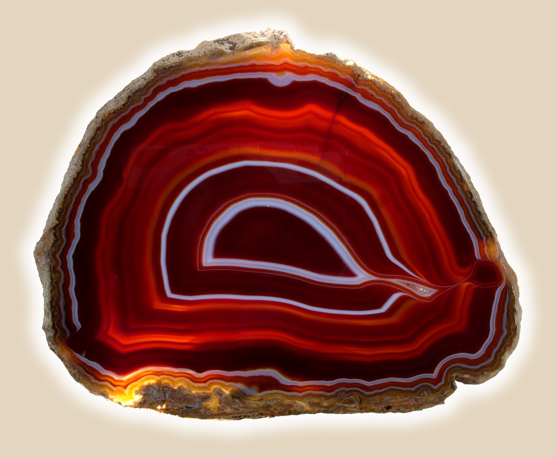 Agate slice